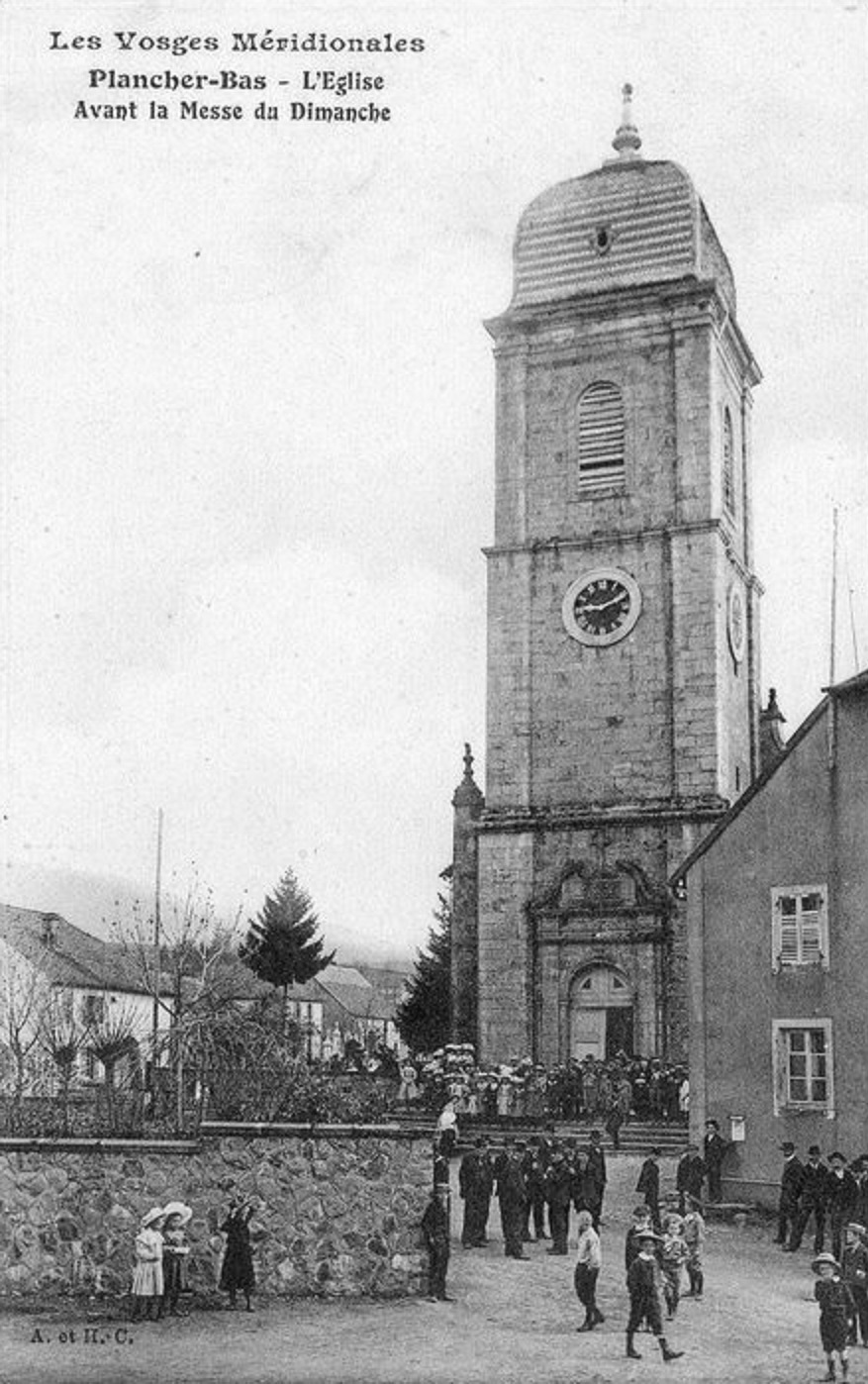 L'église de Plancher-Bas (Haute-Saône) avant la messe du dimanche.